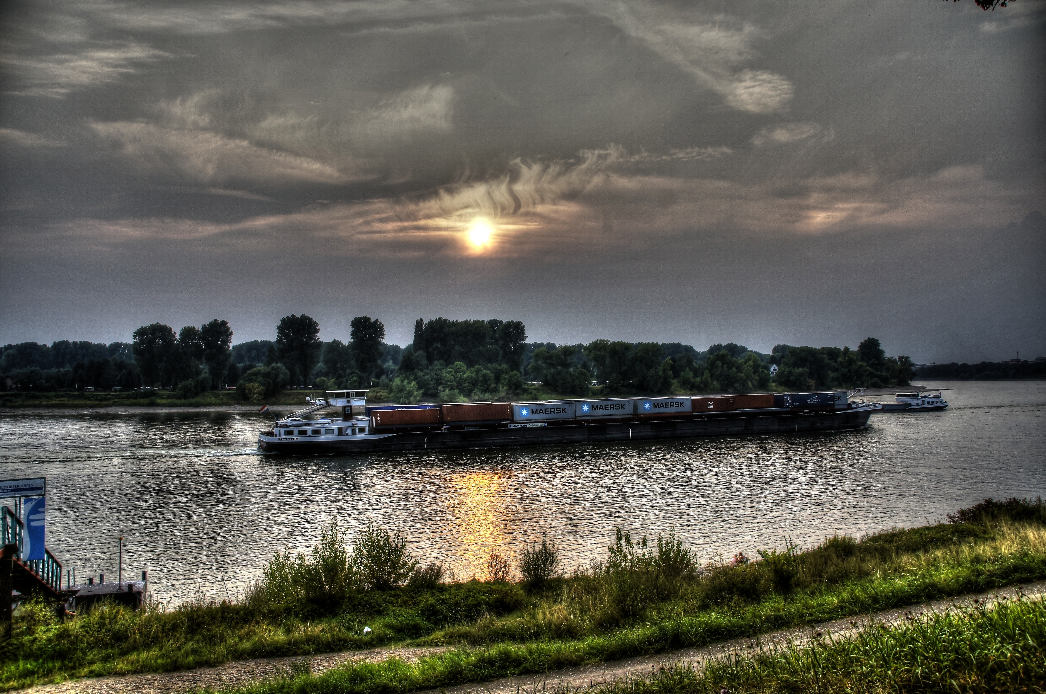 Sonnenuntergang am Rheinufer bei Düsseldorf --- Sunset at the banks of Düsseldorf